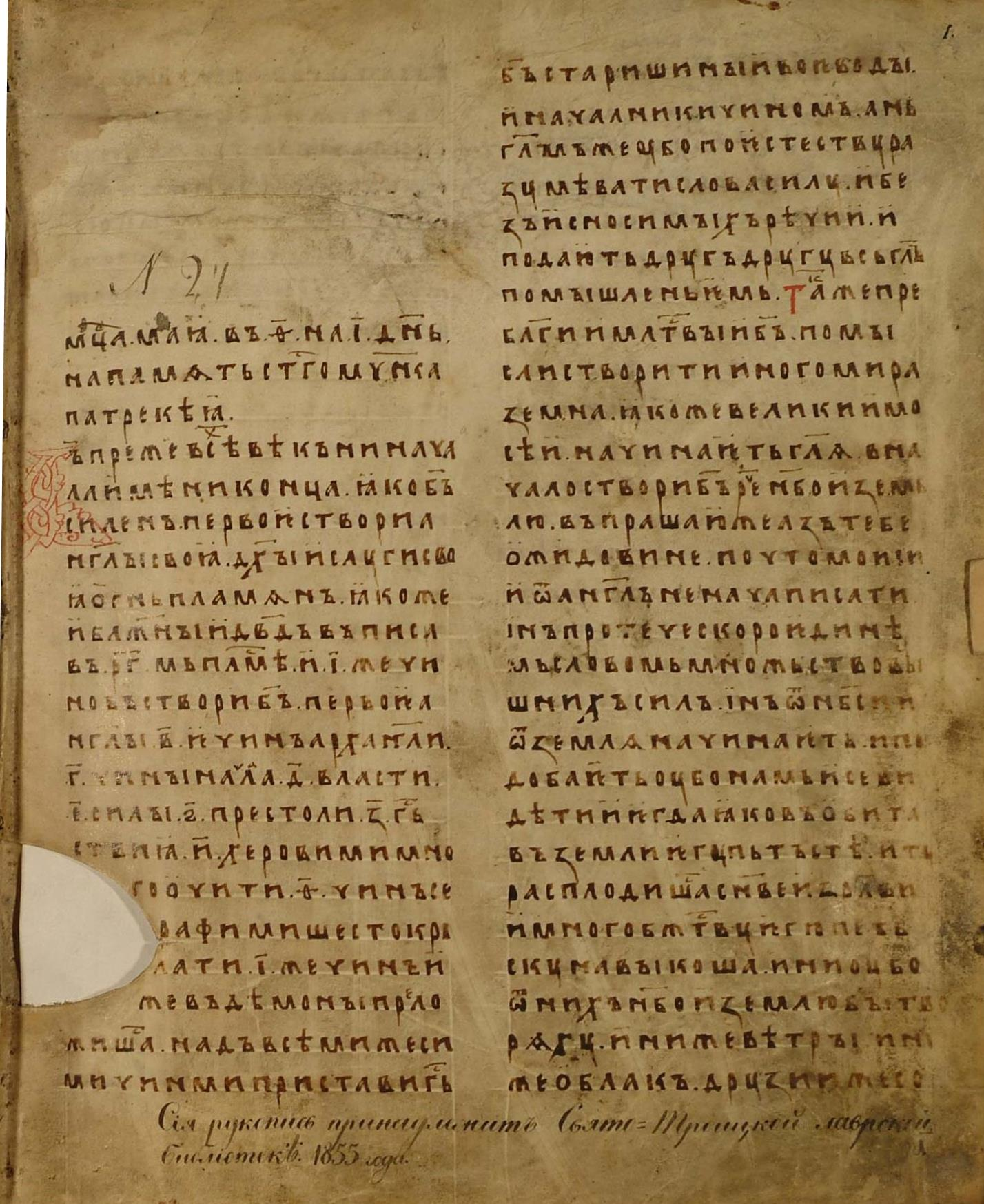 Рукопись № 38. (2014). Палея (от греч. palaiós – ветхий), напис. 1406 года, устав. в два столбца, в лист, 208 л. Фонд 304.I. Главное собрание библиотеки Троице-Сергиевой лавры